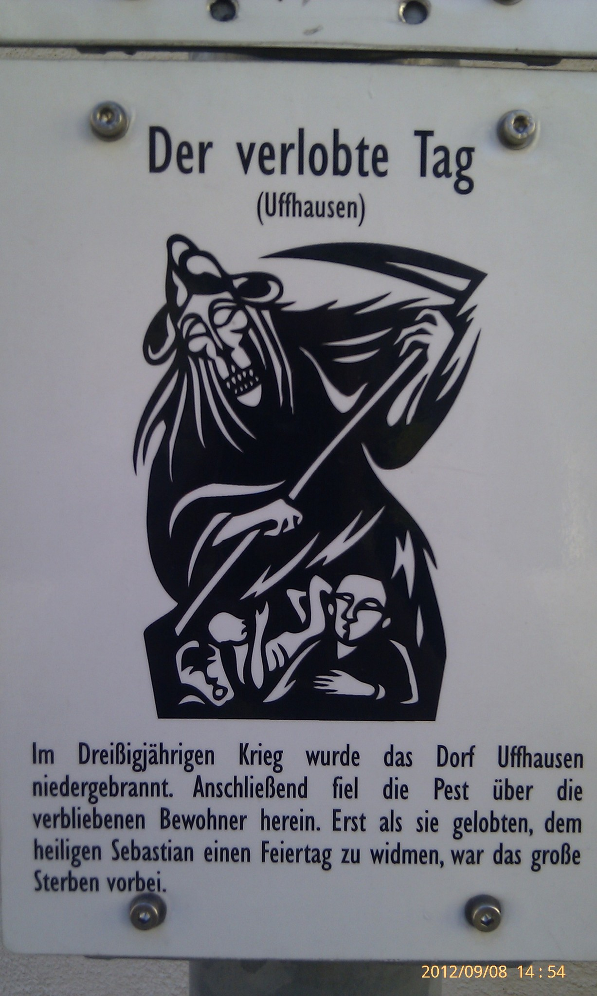 Heppenheim, Germany